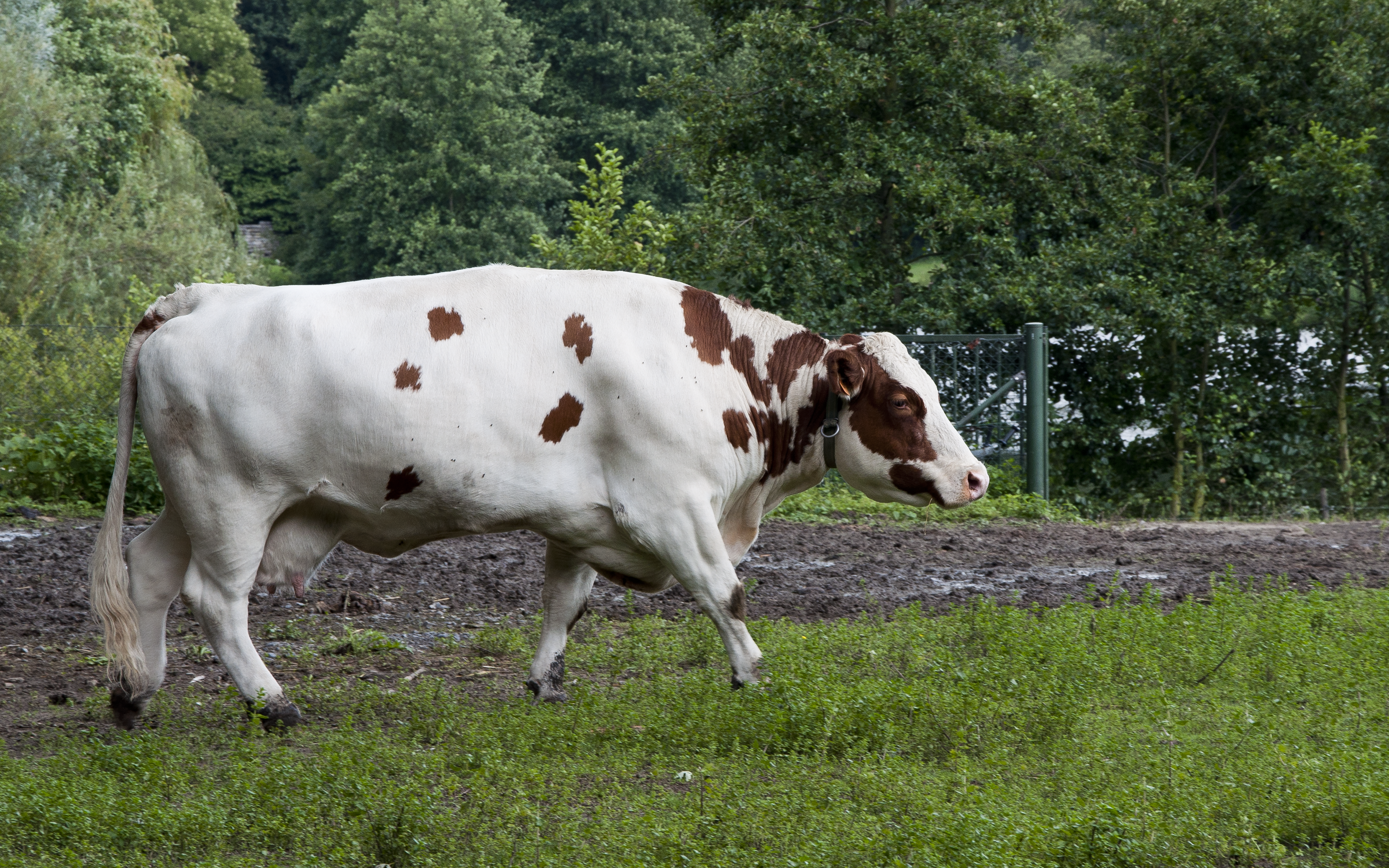 Oost-Vlaams witrood in Puyenbroeck, Wachtebeke, België